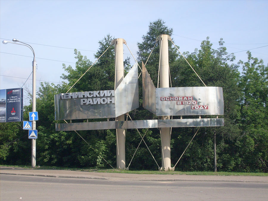 Въездной знак в Ленинский район г. Иркутск справа